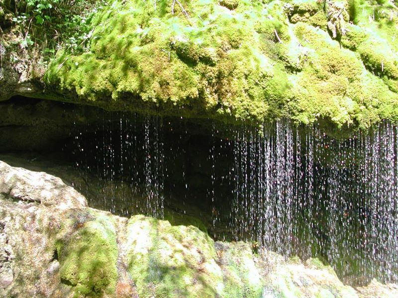 Durch Entzug von CO2 durch die Mosse fällt aus dem Wasser Kalk aus, es kommt zur Bildung von Sintern.